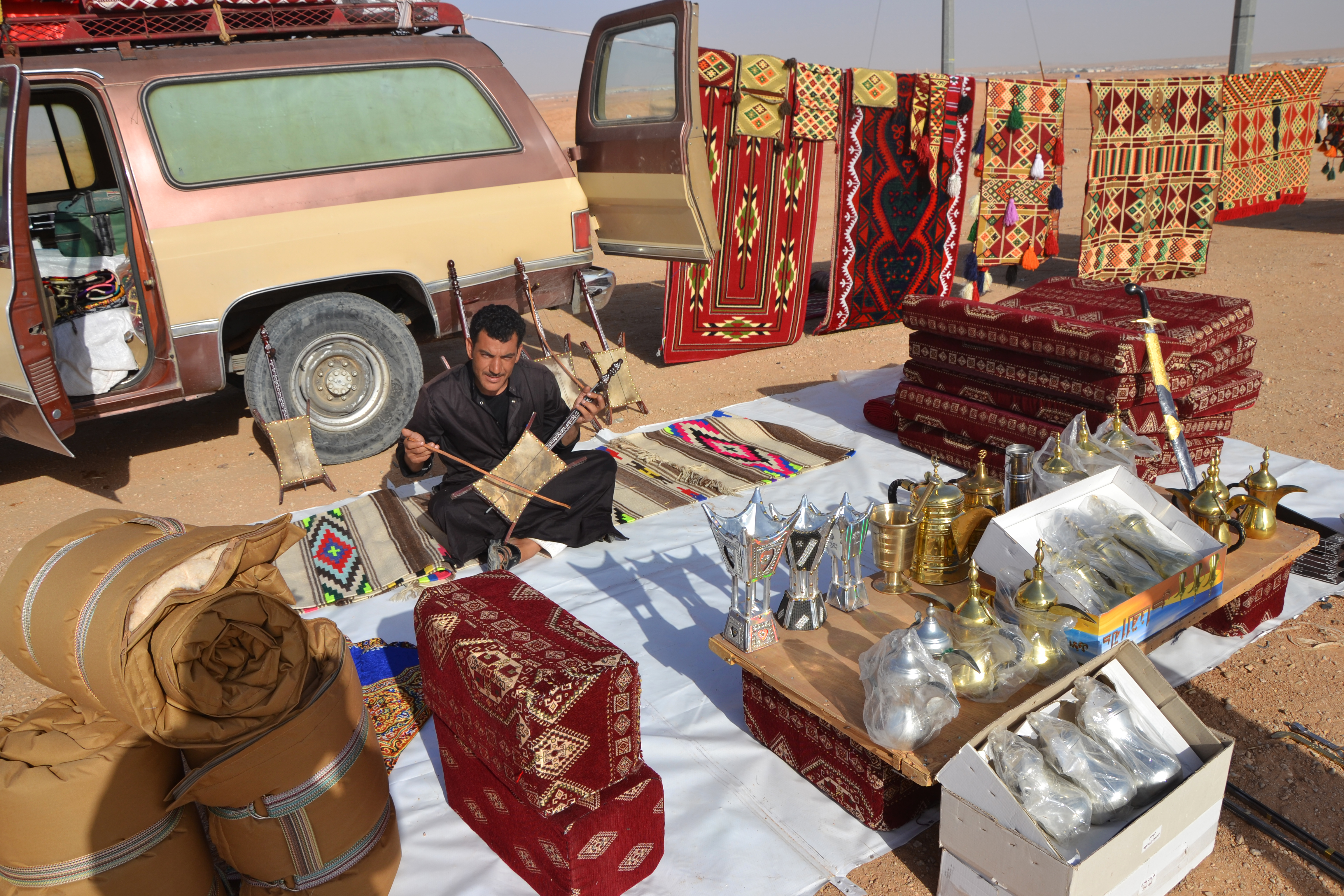 Saudi Arabia